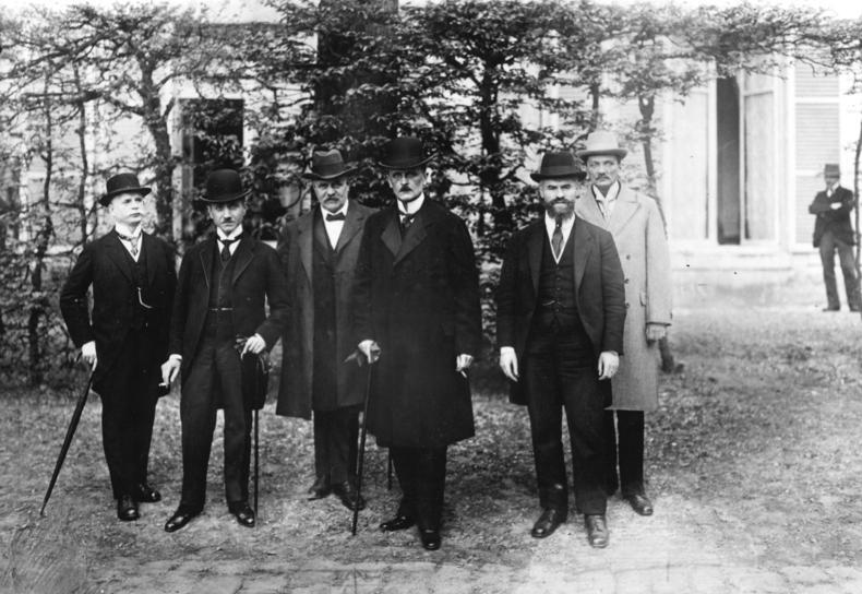 Versailles : die deutschen Friedensunterhändler vor ihrer Abfahrt ins Hotel Trianon. Von links : Leinert, Melchior, Giesbert, Brockdorf-Rantzau, Landsberg, Schücking.